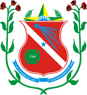 Brasão da cidade de: Bragança (Pará)